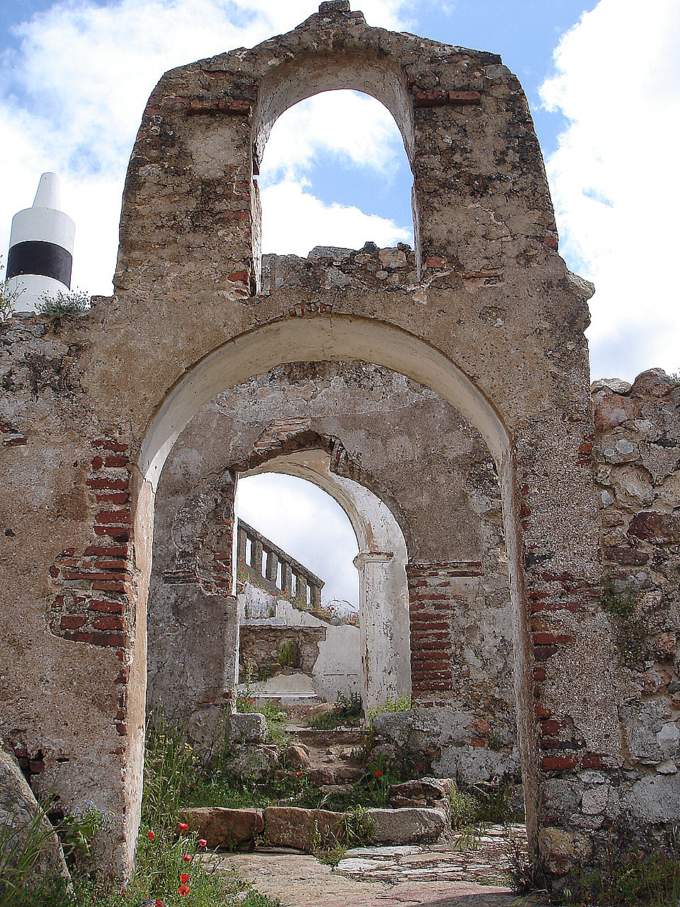 Alter do Chão This file was uploaded for Wiki Loves Monuments in Portugal with the unique identifier 73823.